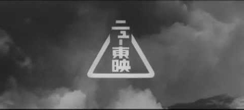 ニュー東映、1961年、カットタイトル(トップロゴ)。